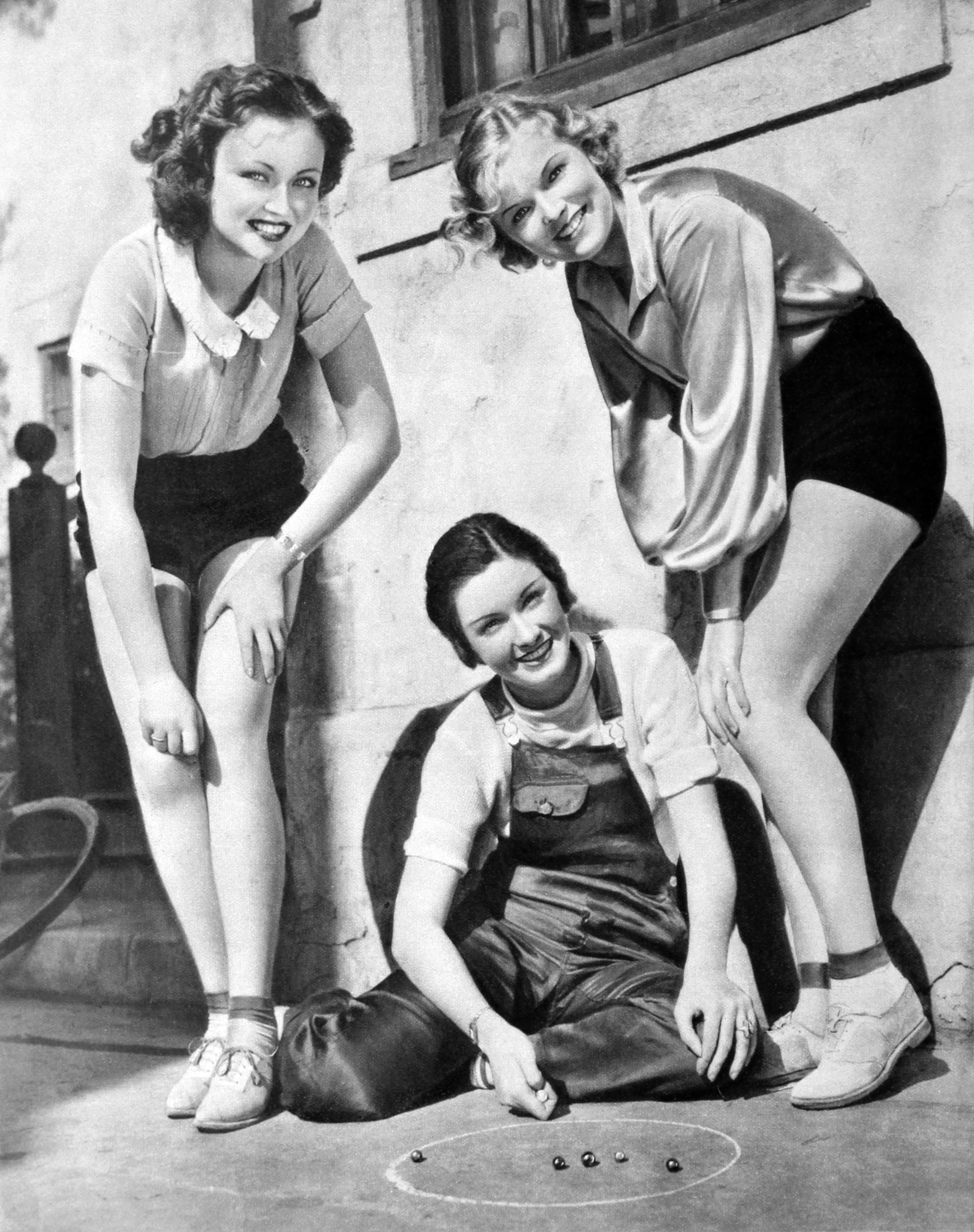 Lona Andre, Gail Patrick e Verna Hillie